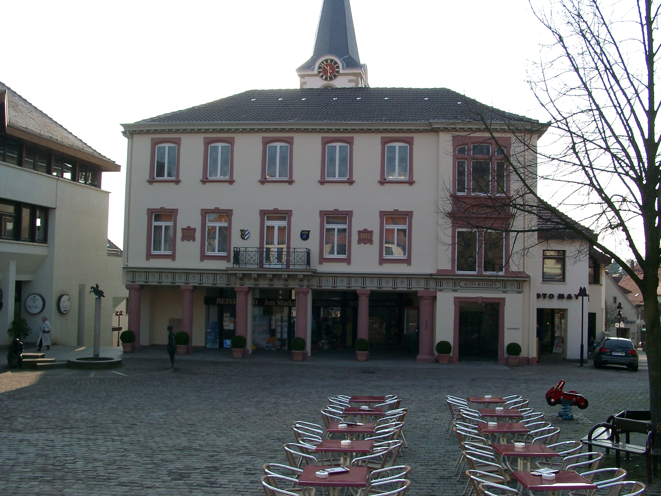 Wiesloch, Altes Rathaus